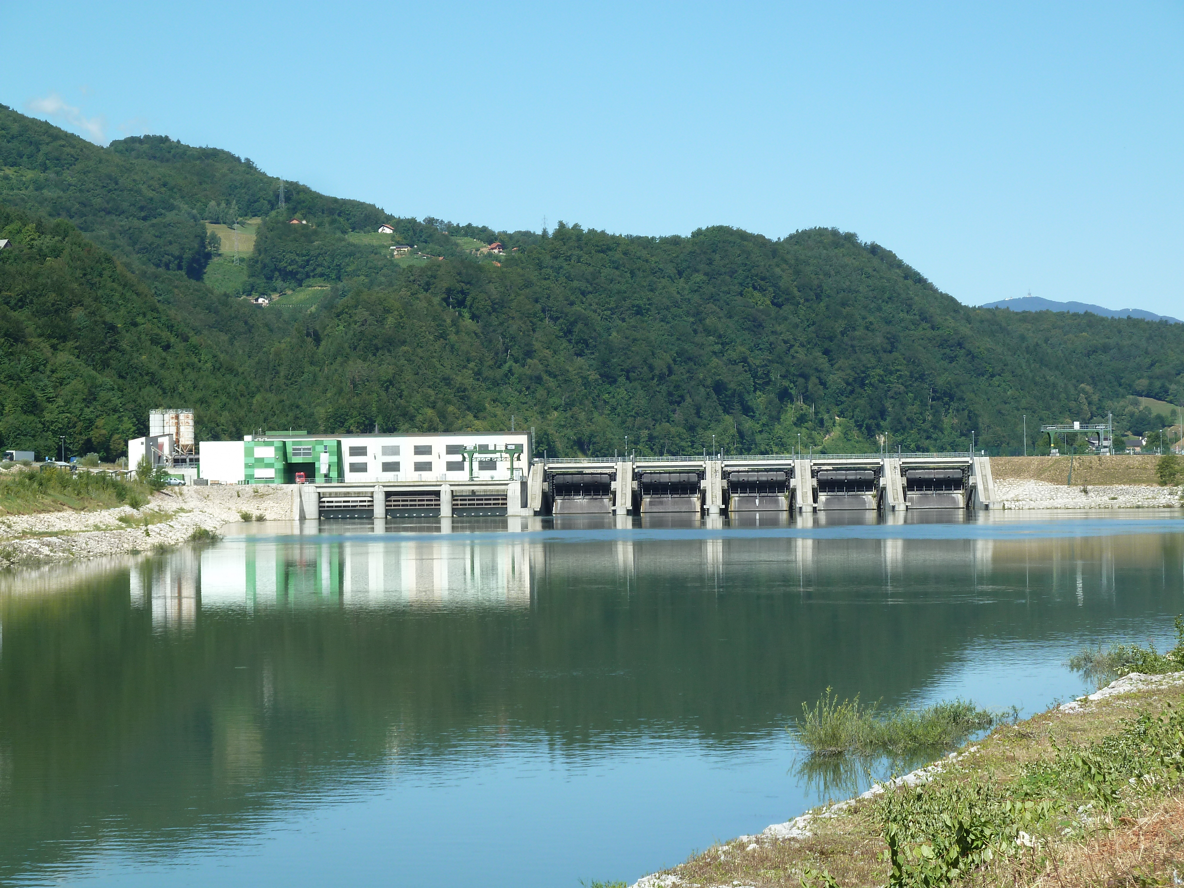 Hidroelektrarna Boštanj na Savi.